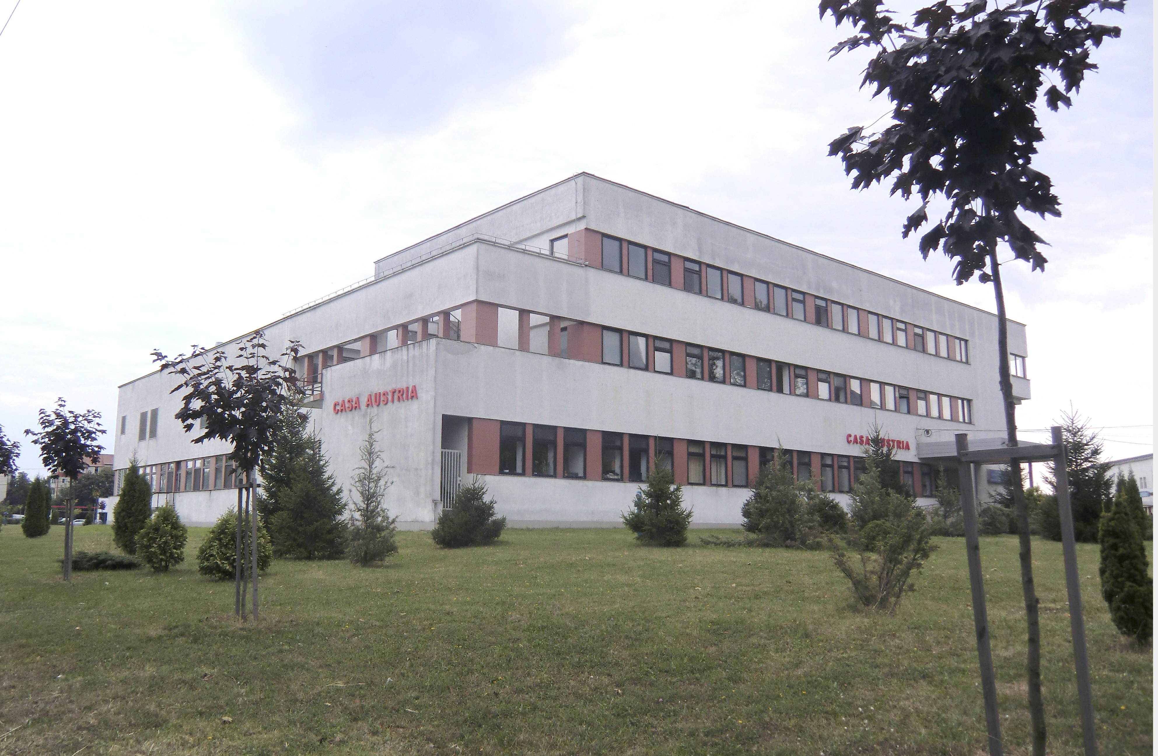 Casa Austria, Unfallkrankenhaus in Temeswar